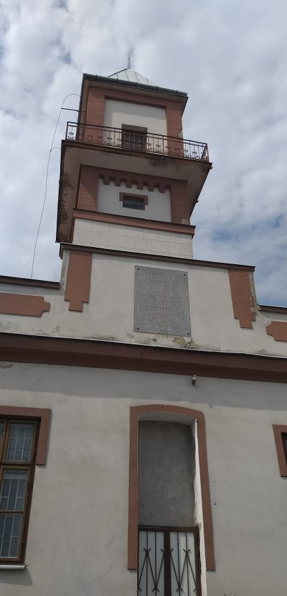 Tűzoltó torony Sátoraljaújhelyen, épült 1888-ban (volt tűzoltó állomás)